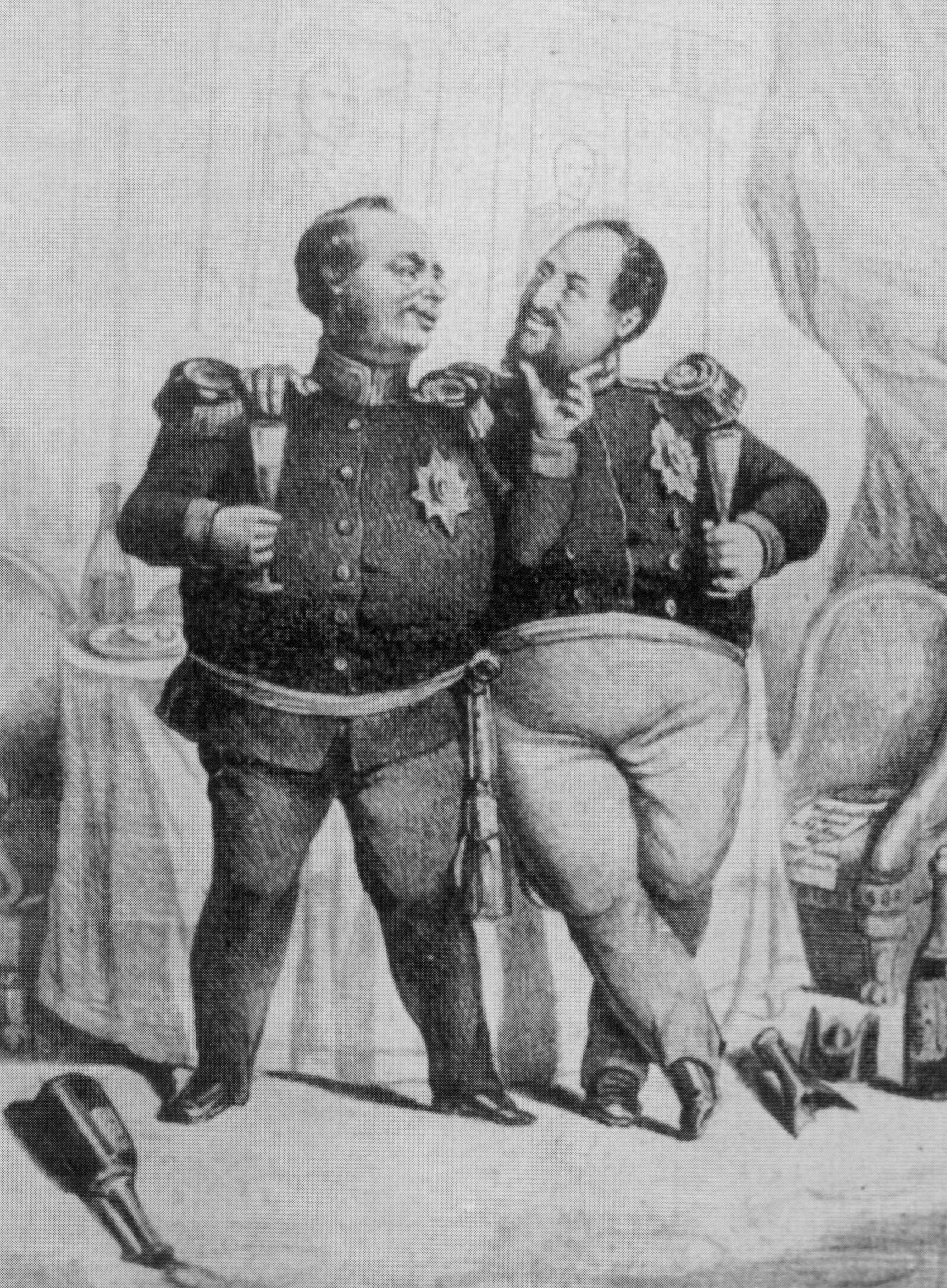 Der preußische König Friedrich Wilhelm IV. und der dänische König Frederik VII, Karikatur anlässlich des Waffenstillstands von Malmö. Friedrich Wilhelm: “Na, alter Junge, habe ich es dir recht gemacht?”